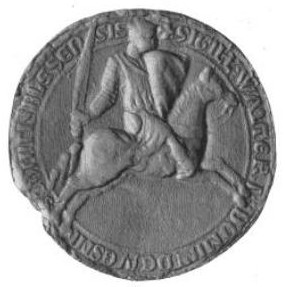 Gautier II d'Avesnes